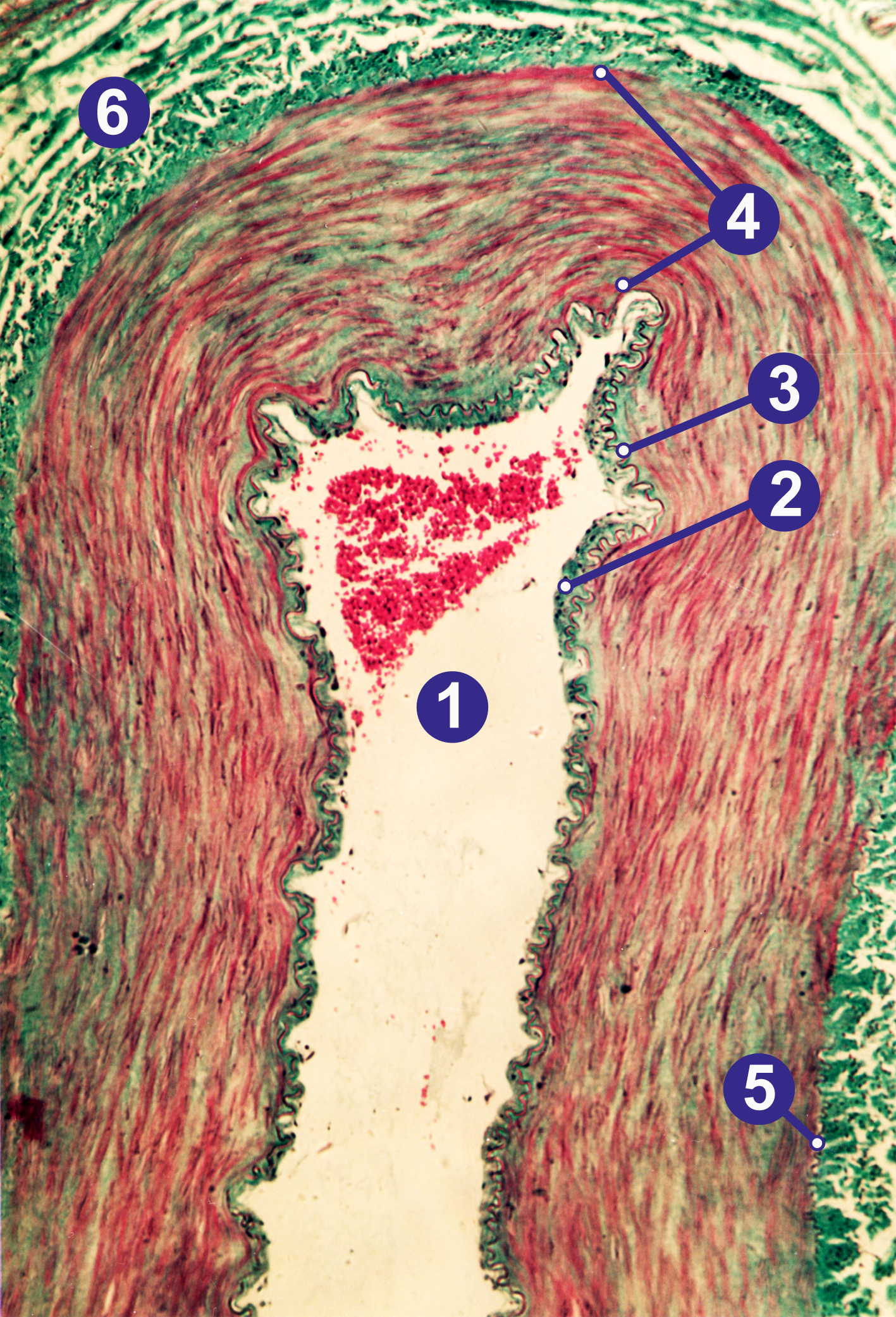 Querschnitt durch eine große menschliche Arterie. Trichromfärbung nach Masson-Goldner, Objektiv 56x: (1) Lumen mit einigen Erythrozyten, (2) Tunica intima, (3) Membrana elastica interna, (4) Tunica media, (5) Membrana elastica externa, (6) Tunica adventitia/externa